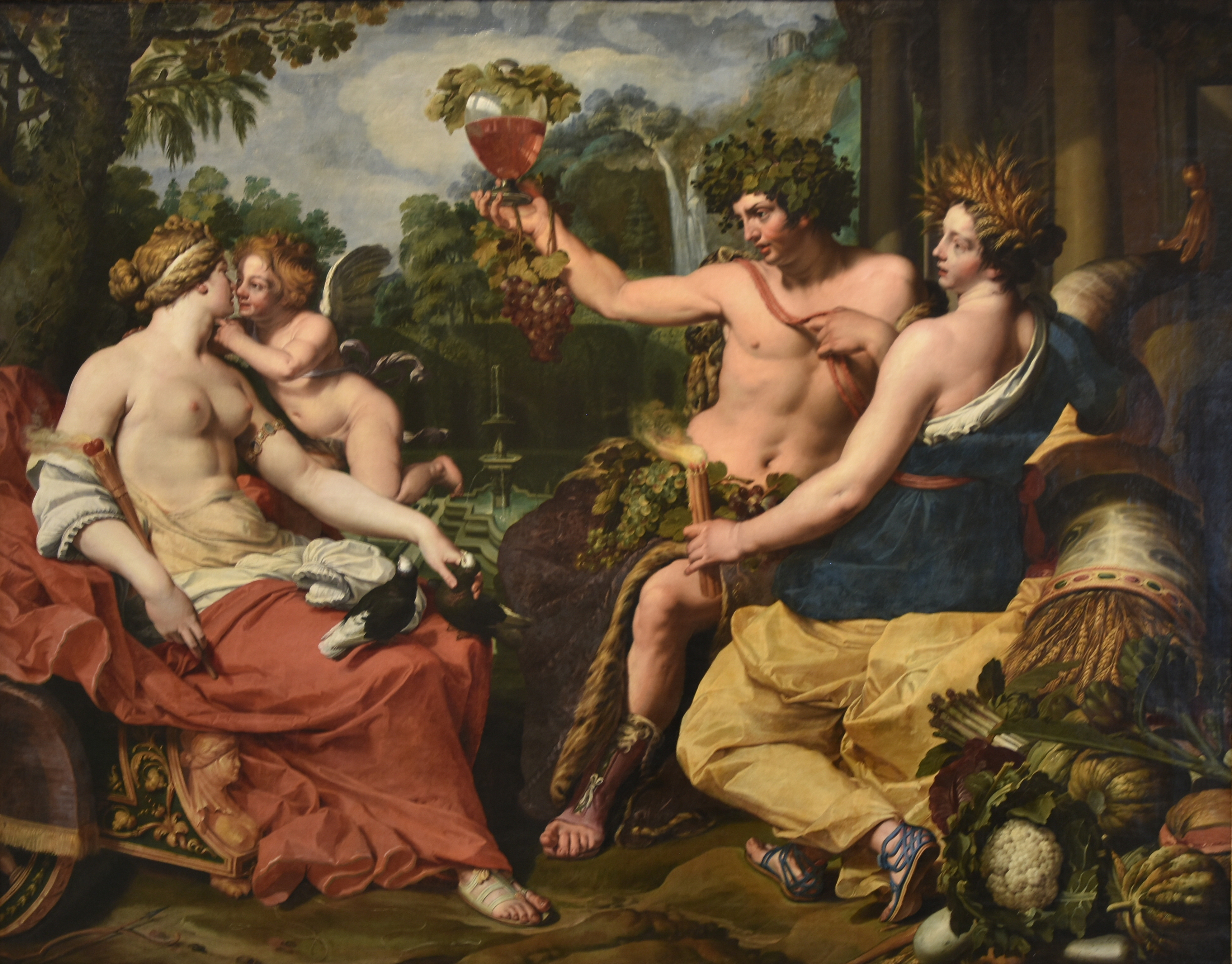 Abraham Janssens (ca.1573-1632) Ceres, Bacchus en Venus, Noordbrabants Museum 's-Hertogenbosch